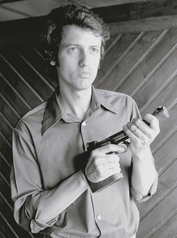 Corneliu Ion